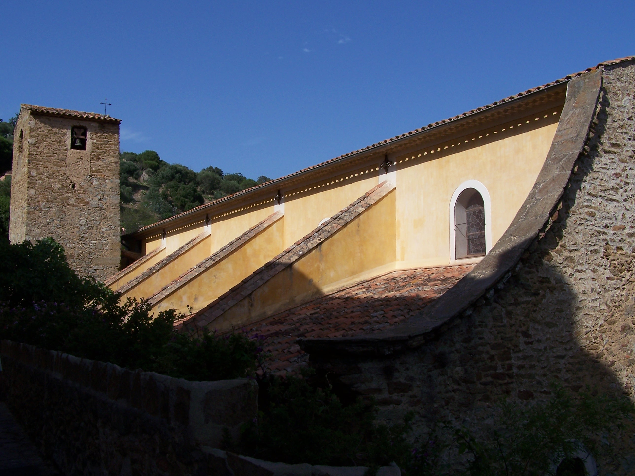 Eglise Sainte Trophyme